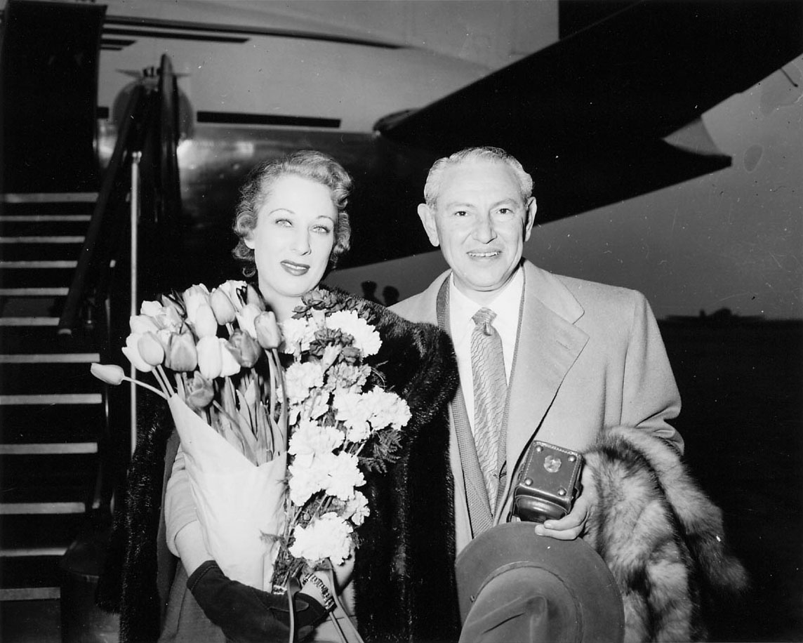 Aankomst van de Amerikaanse cosmetica-fabrikant Max Factor en zijn echtgenote Mildred Dorothy Cohen-Factor, Schiphol, 17 april 1953. Foto Ben van Meerendonk / AHF, collectie IISG, Amsterdam